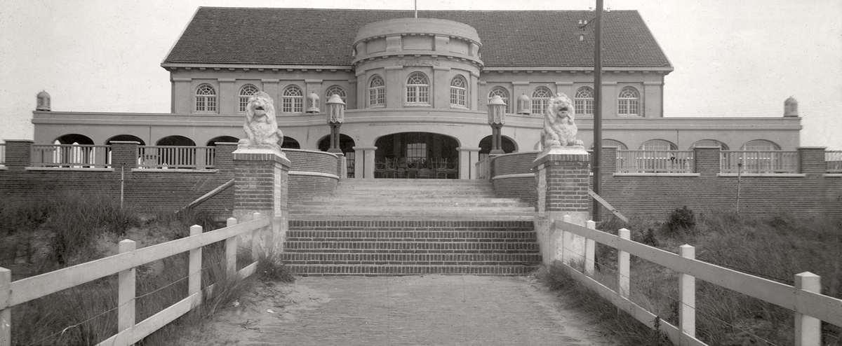 Het Kurhaus in Zandvoort in 1916. Foto van Kees Hofkers